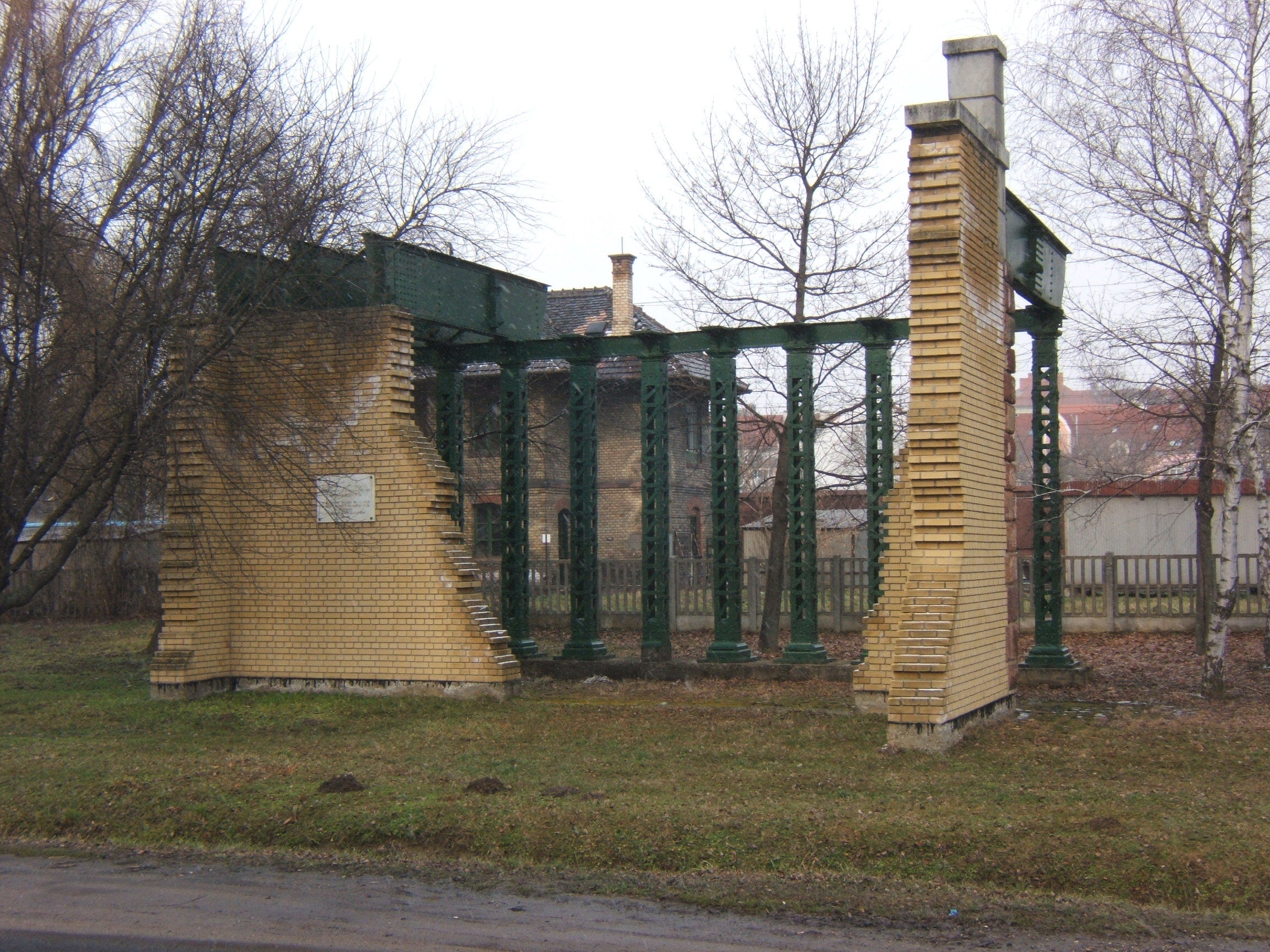 Kaposváron az 1898-ban épített vasúti gyalogos felüljáró emlékműve (a felüljárót 1989-ben bontották le a vasút villamosításakor)